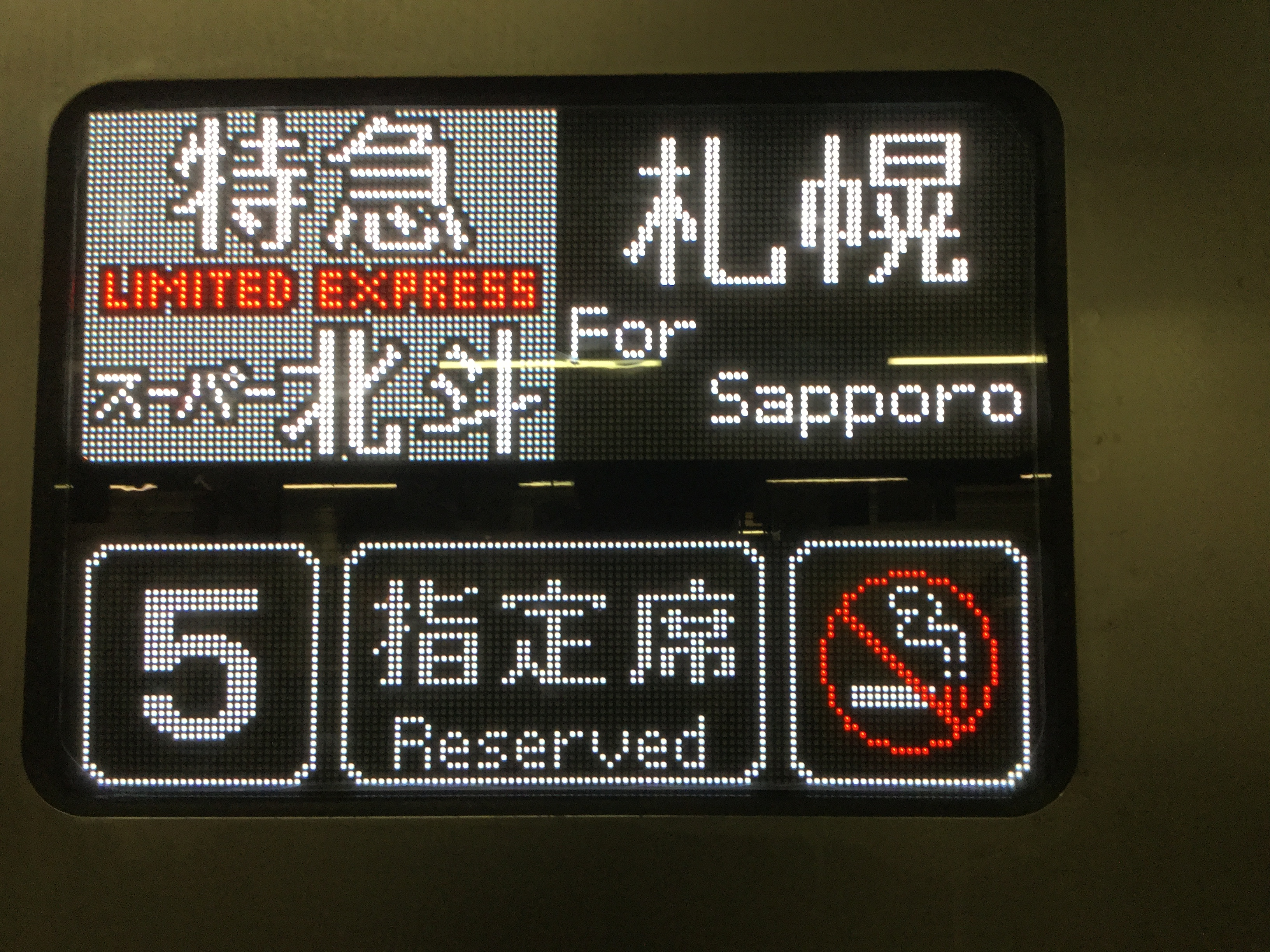 列番4D特急スーパー北斗札幌行/札幌駅